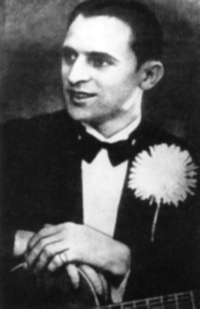 Russian Singer Pjotr Leschenko